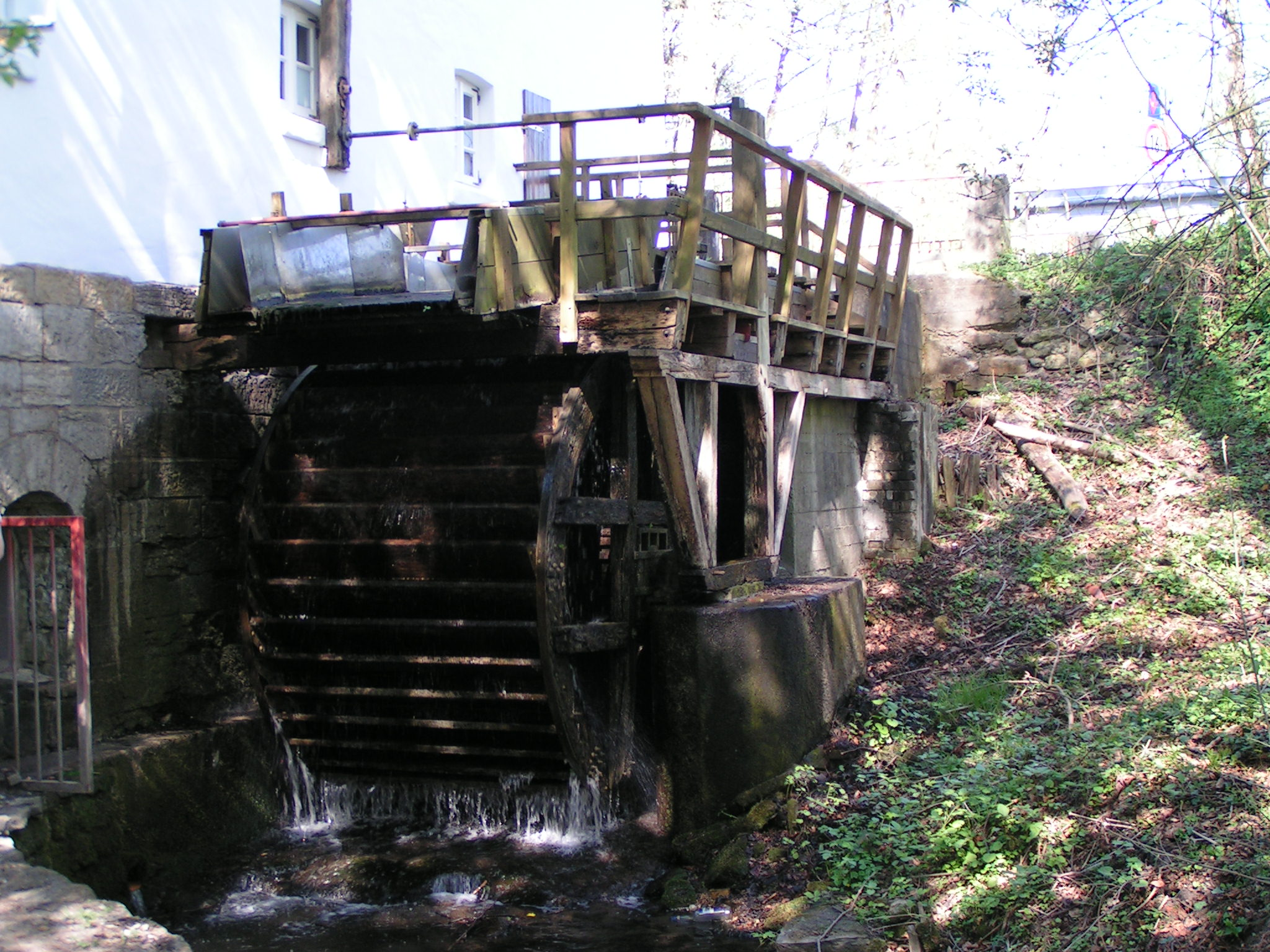 Wasserrad von Niemöllers Mühle in Bielefeld-Quelle